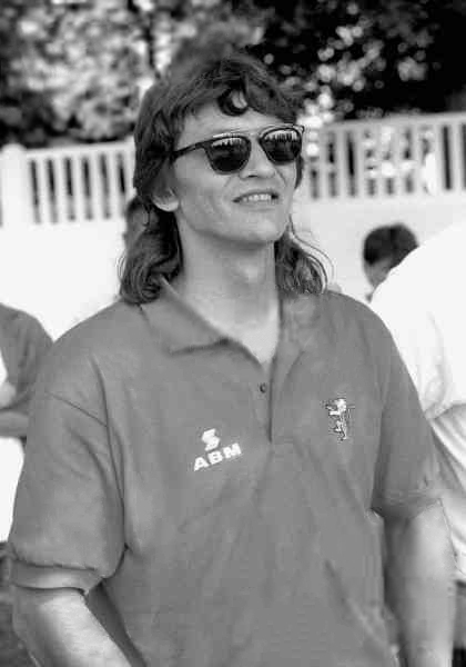 Dănuț Lupu